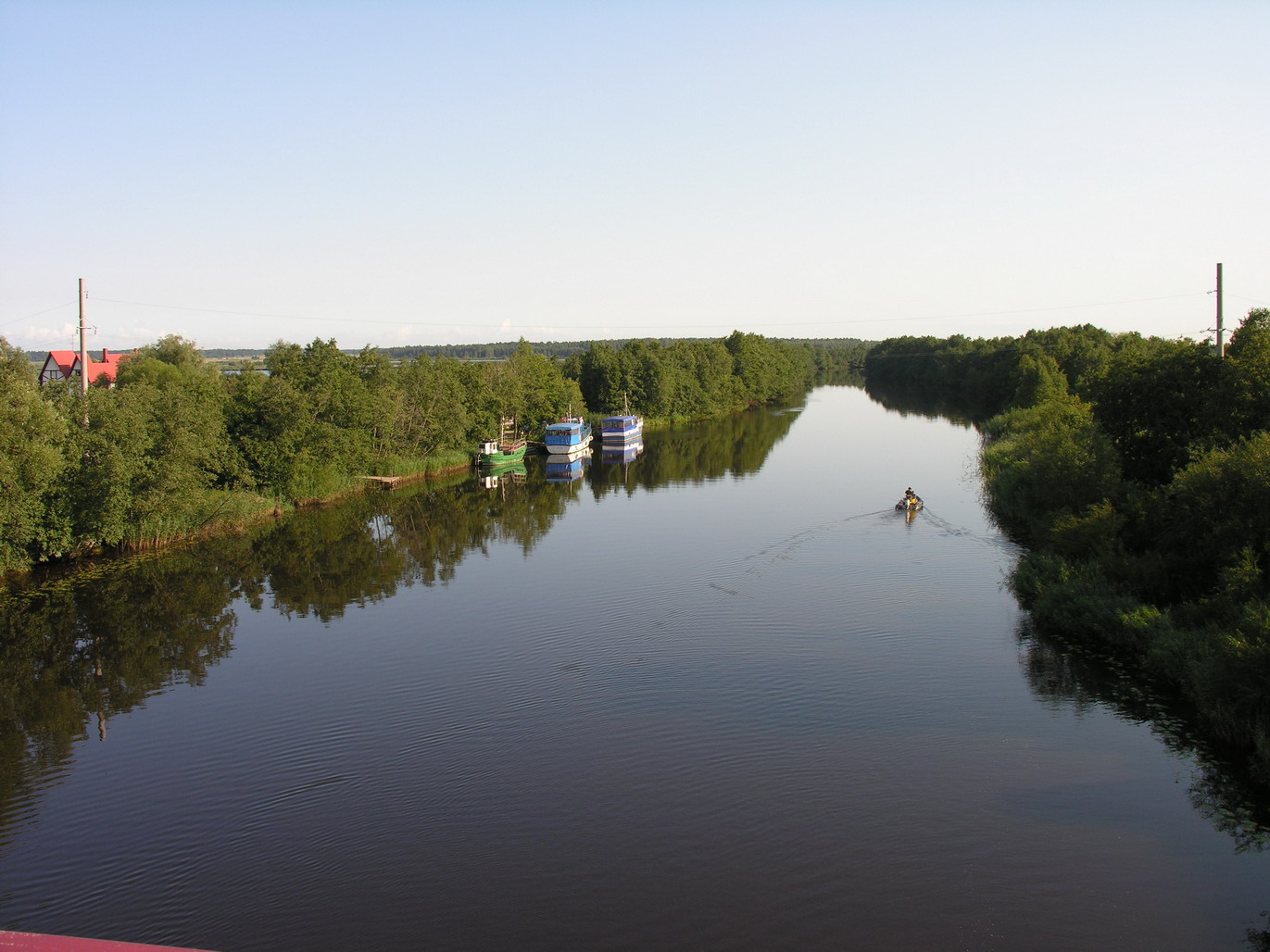 Žemaitėška: Minėjė